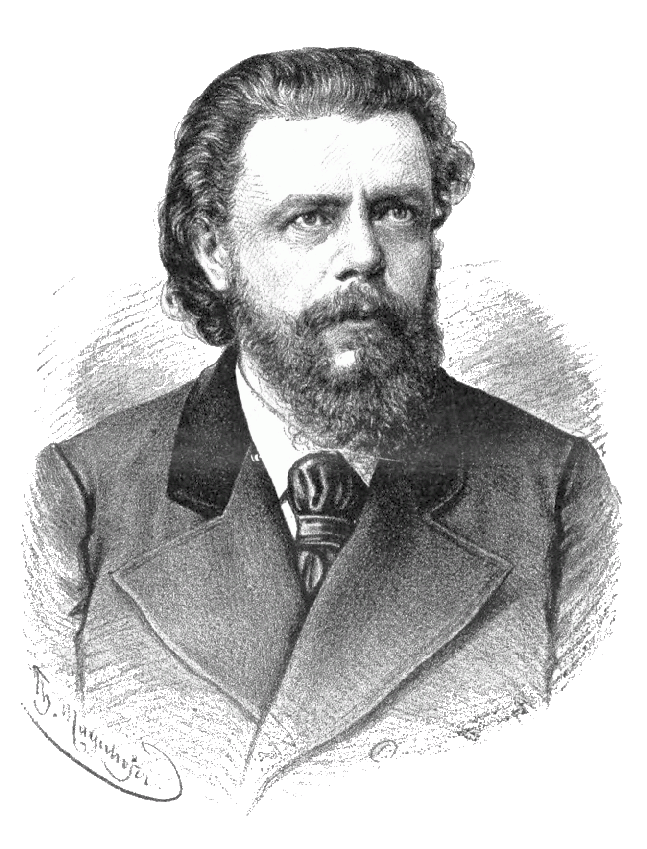 Erazmo Barčić (1830–1913), Croatian jurist and politician